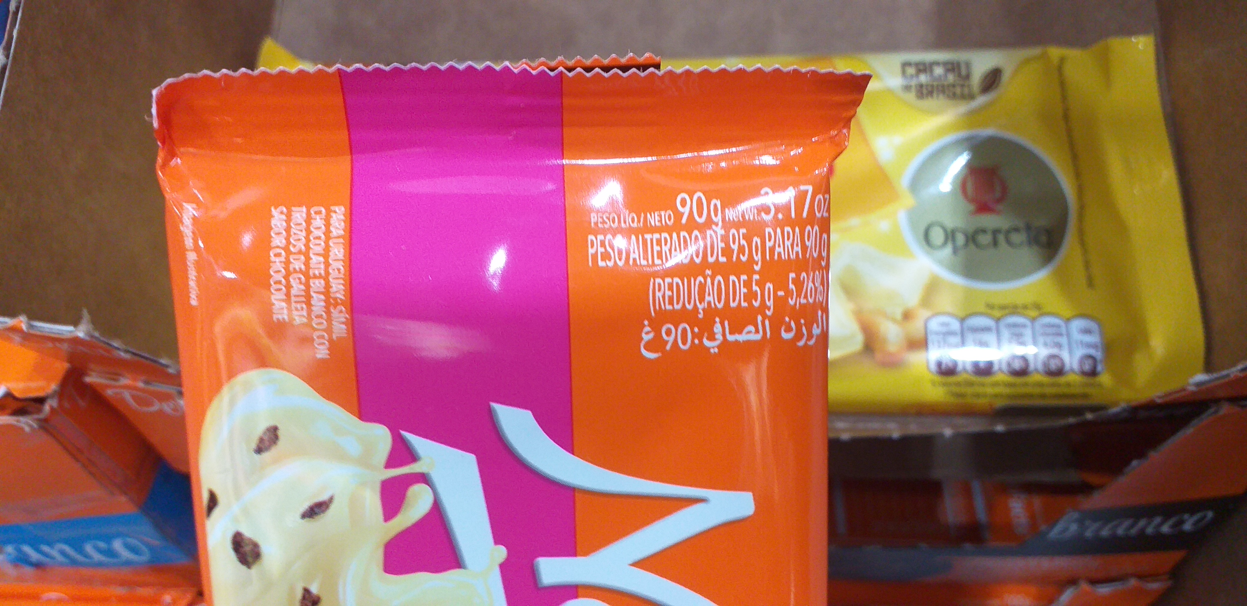 Barra de chocolate com volume reduzido